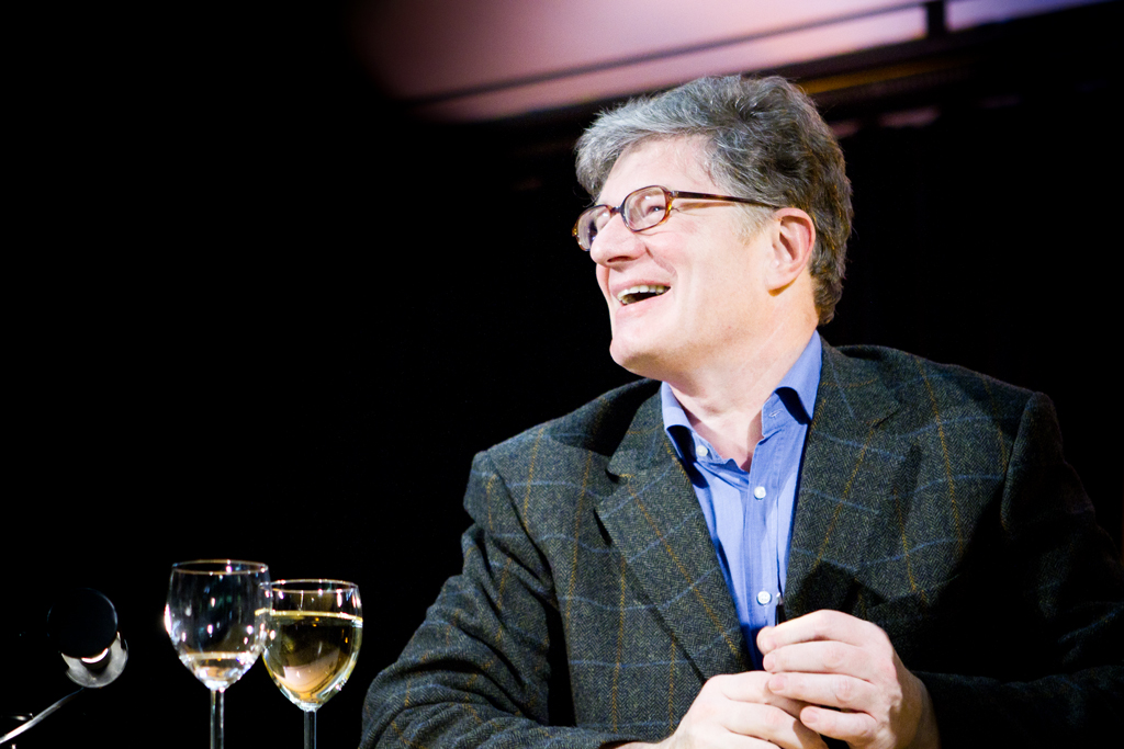 Roger Willemsen in Siegburg Buchvorlesung